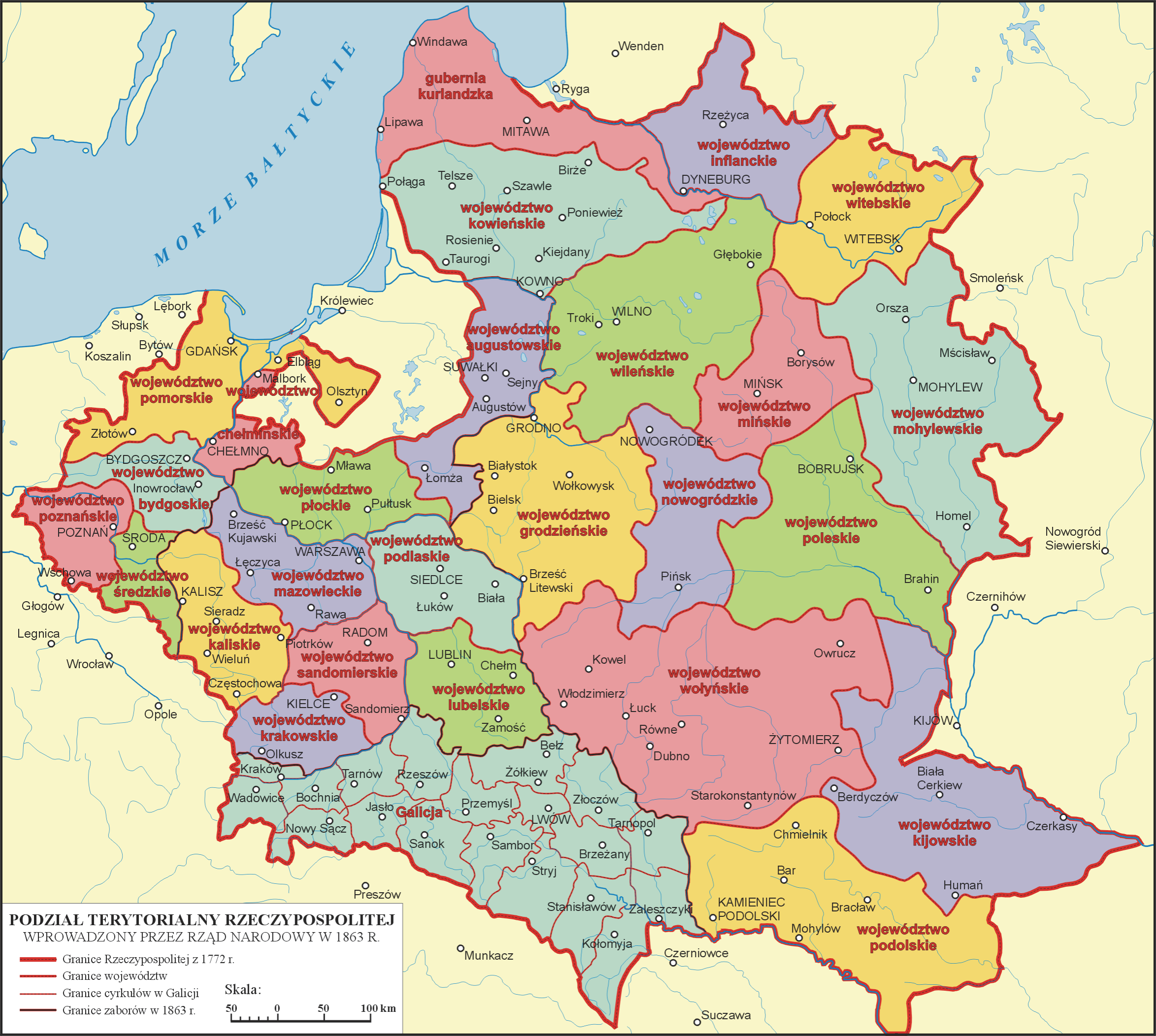 Podział terytorialny Rzeczypospolitej w granicach z 1772 r. wprowadzony przez Rząd Narodowy w 1863 r.